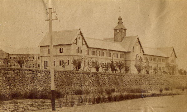 工学寮工学校校舎、1874年頃